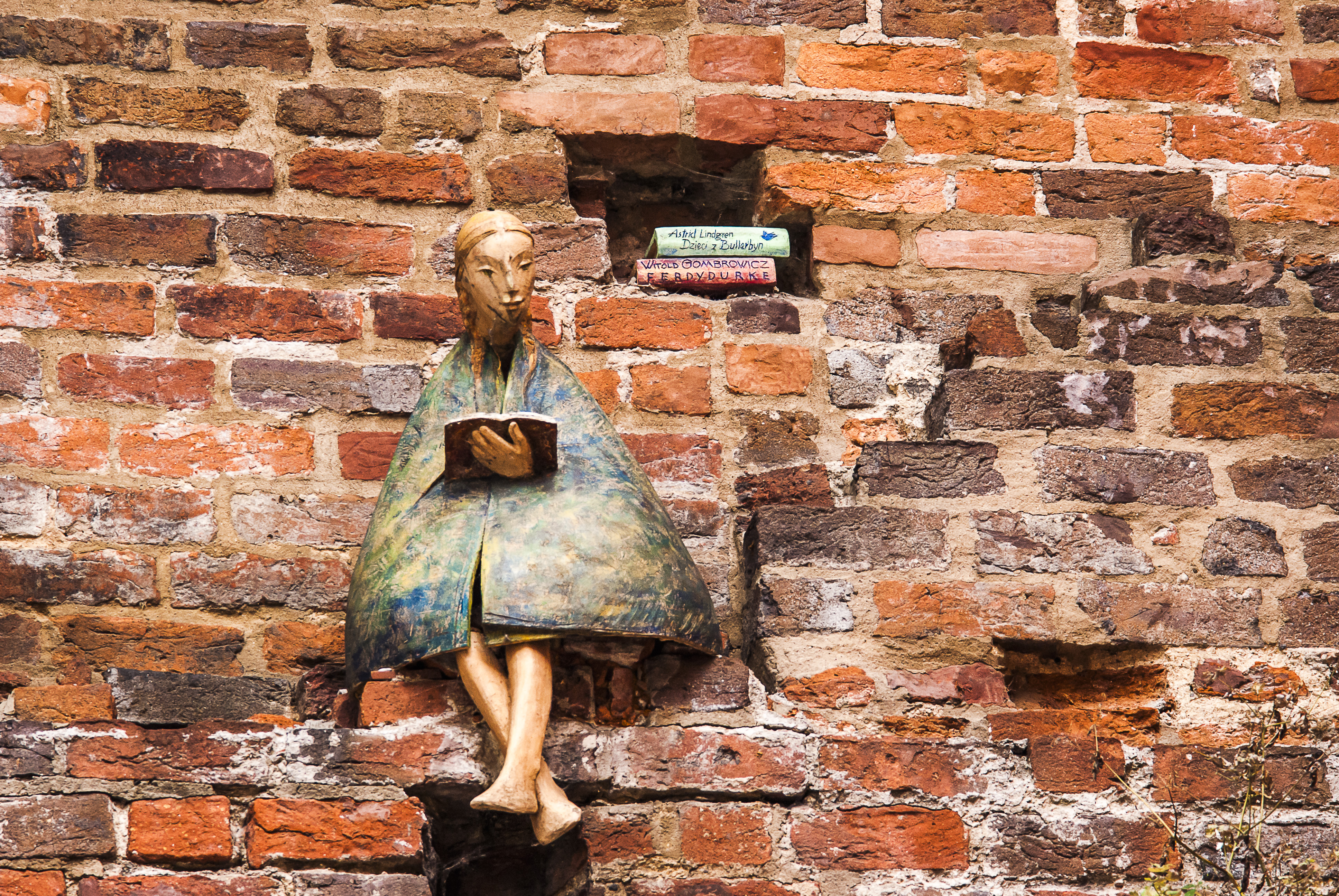 Figurki mieszczan, ulica Podmurna, Galeria Pasja, rzeźby ceramiczne autorstwa plastyka Dariusza Przewięźlikowskiego